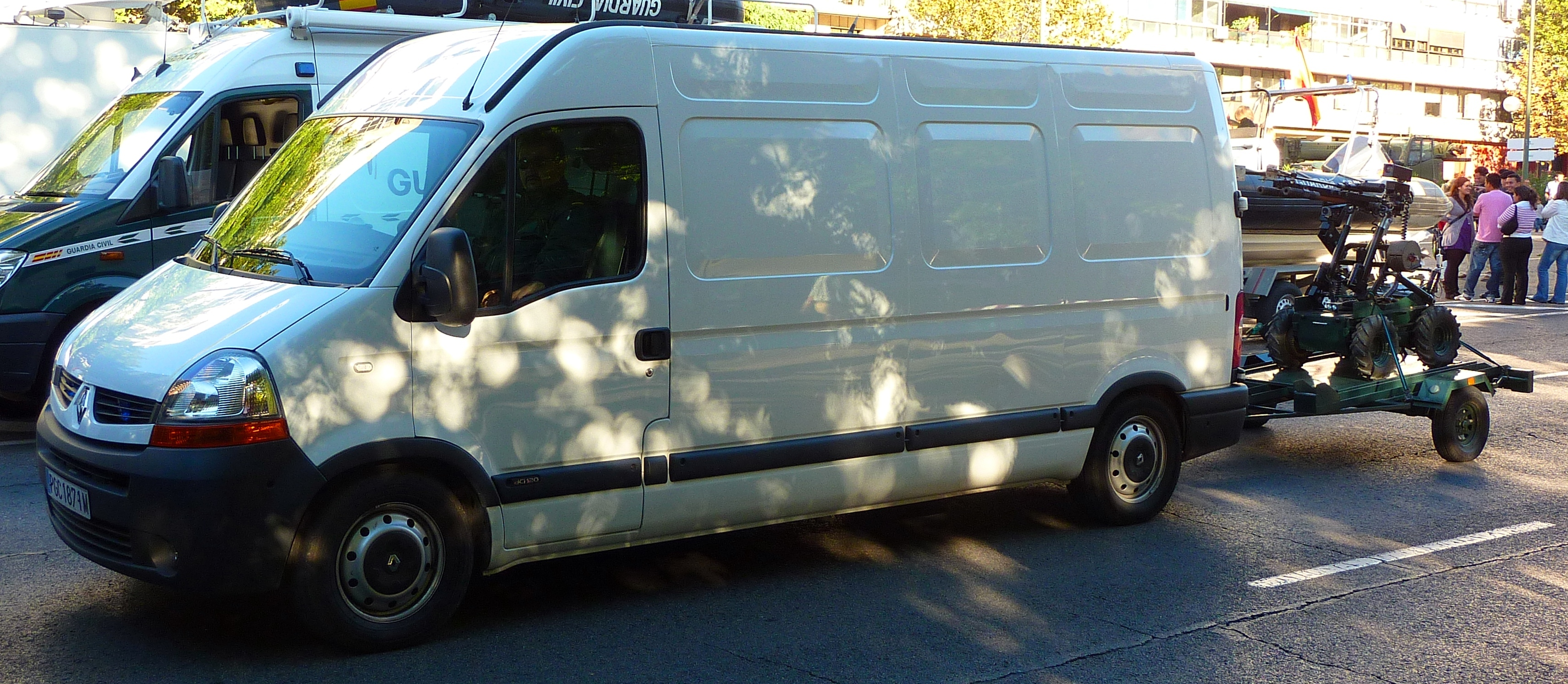 Robot del SEDEX de la Guardia Civil.